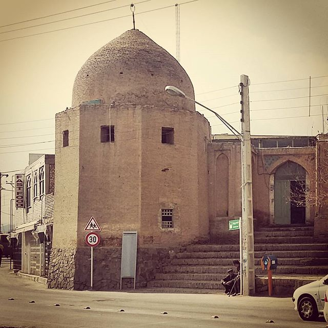 آرامگاه راشد بالله